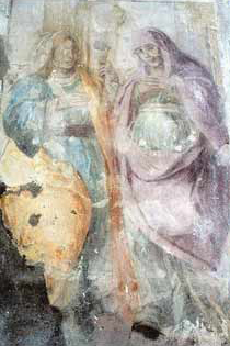 Роспісы Царквы Раства Багародзіцы ў Слаўгарадзе